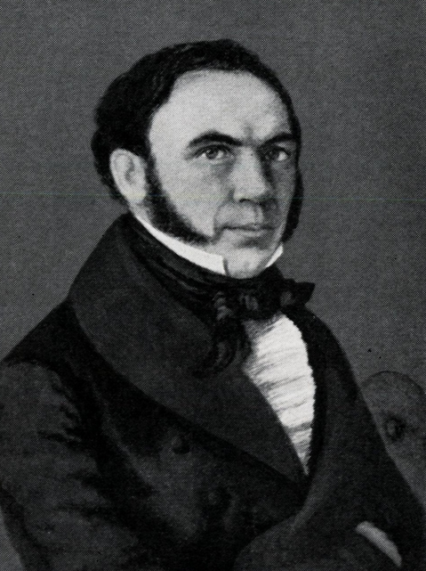 Henrich Helliesen på en av miniatyr Hans Johan Fredrik Berg.